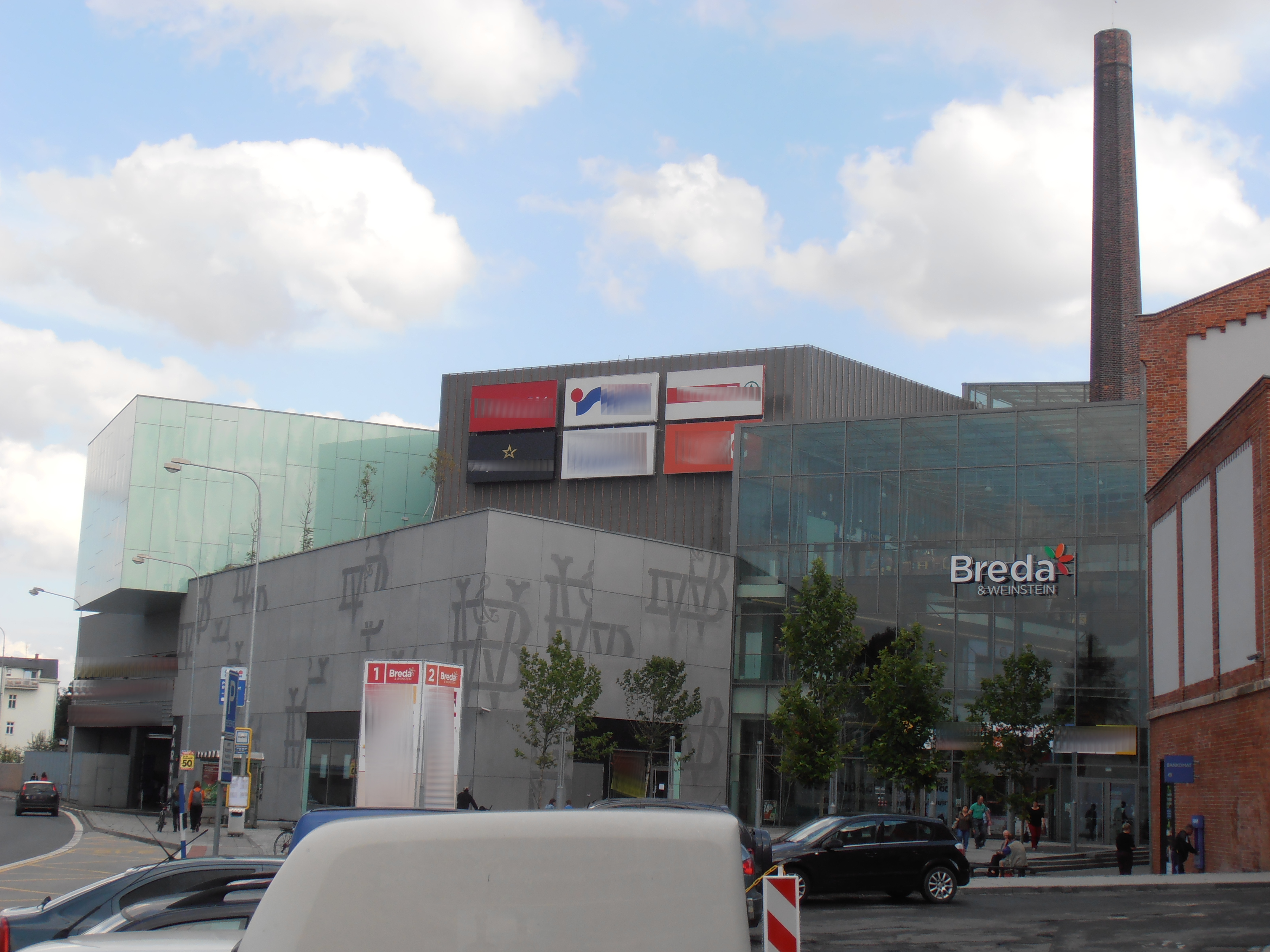 Nákupní centrum Breda & Weinstein v Opavě, pohled z ulice Nákladní